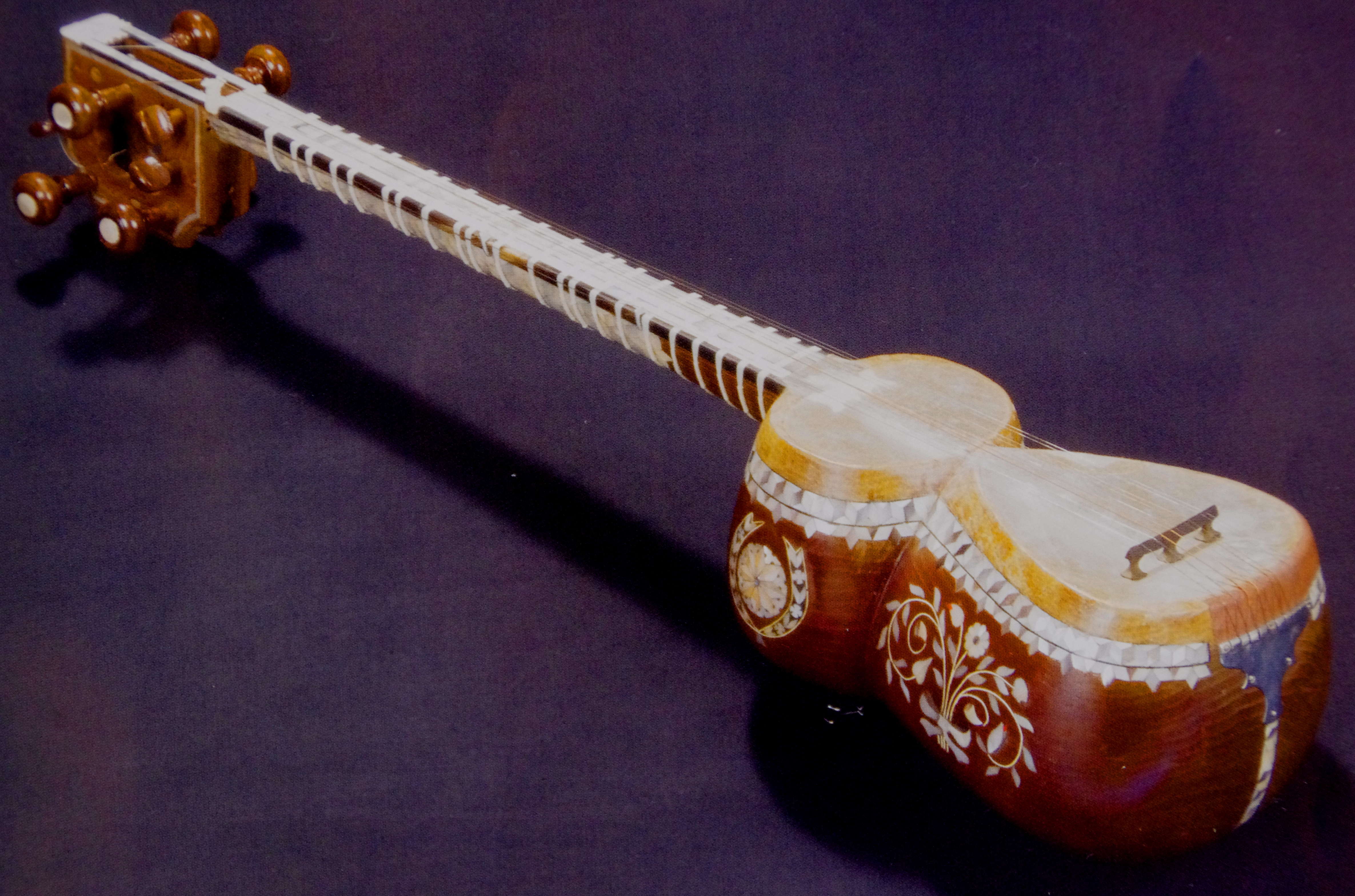 Azərbaycan milli musiqi aləti tar